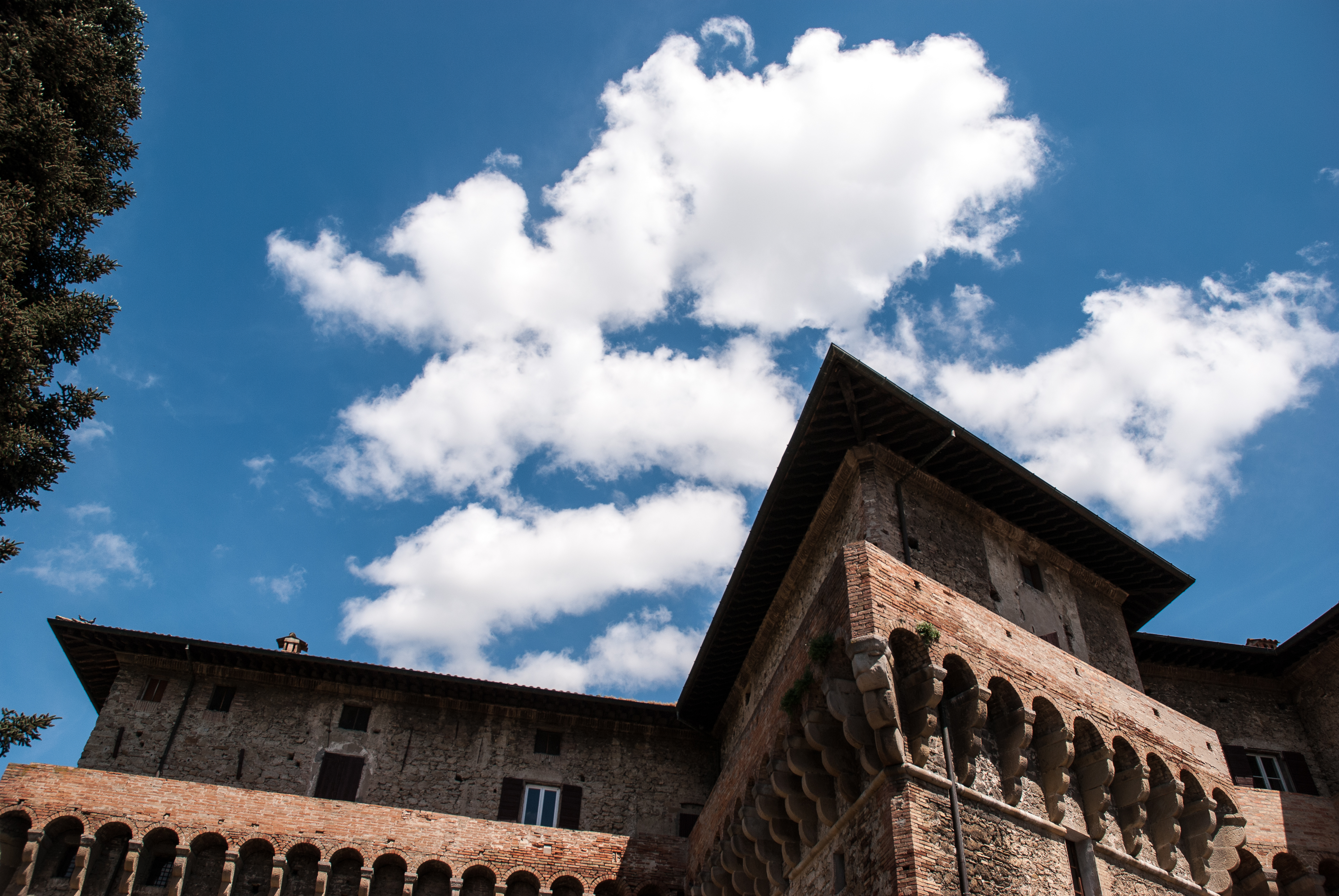 Del XVI secolo, una delle fortezze difensive agli ingressi del borgo